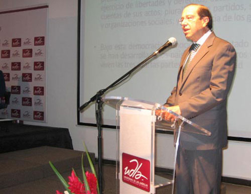 El expresidente de Ecudor, Luis Osvaldo Hurtado Larrea.